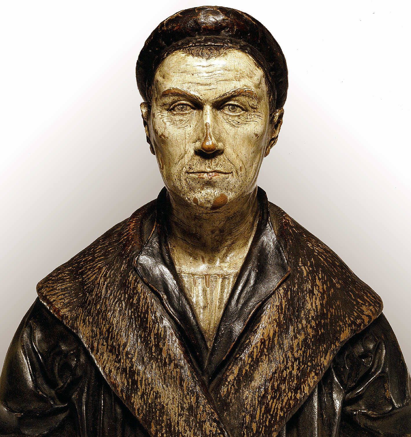 Conrat Meit: Holzbüste Jakob Fugger der Reiche, um 1515; Holz, farbig gefasst, Höhe 17,5 cm (sold at Nagel Auctions, Stuttgart, 21/22 Sep 2006), Bayerisches Nationalmuseum, München; Inv. Nr. L 2006/208; Dauerleihgabe der Ernst-von-Siemens-Kustsstiftung